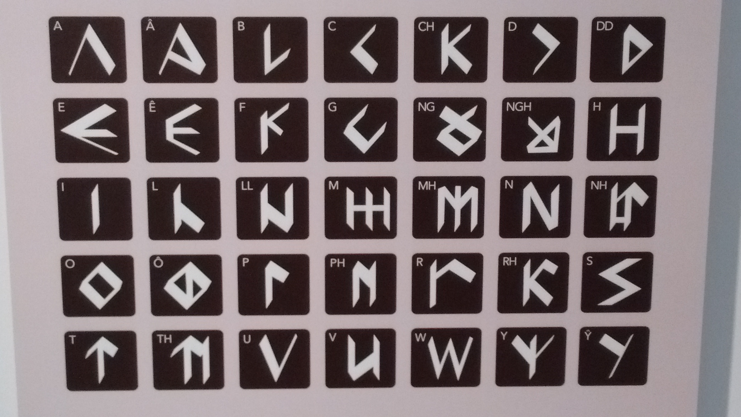 Gwyddor ffug a ddyfeiswyd gan Iolo Morgannwg.